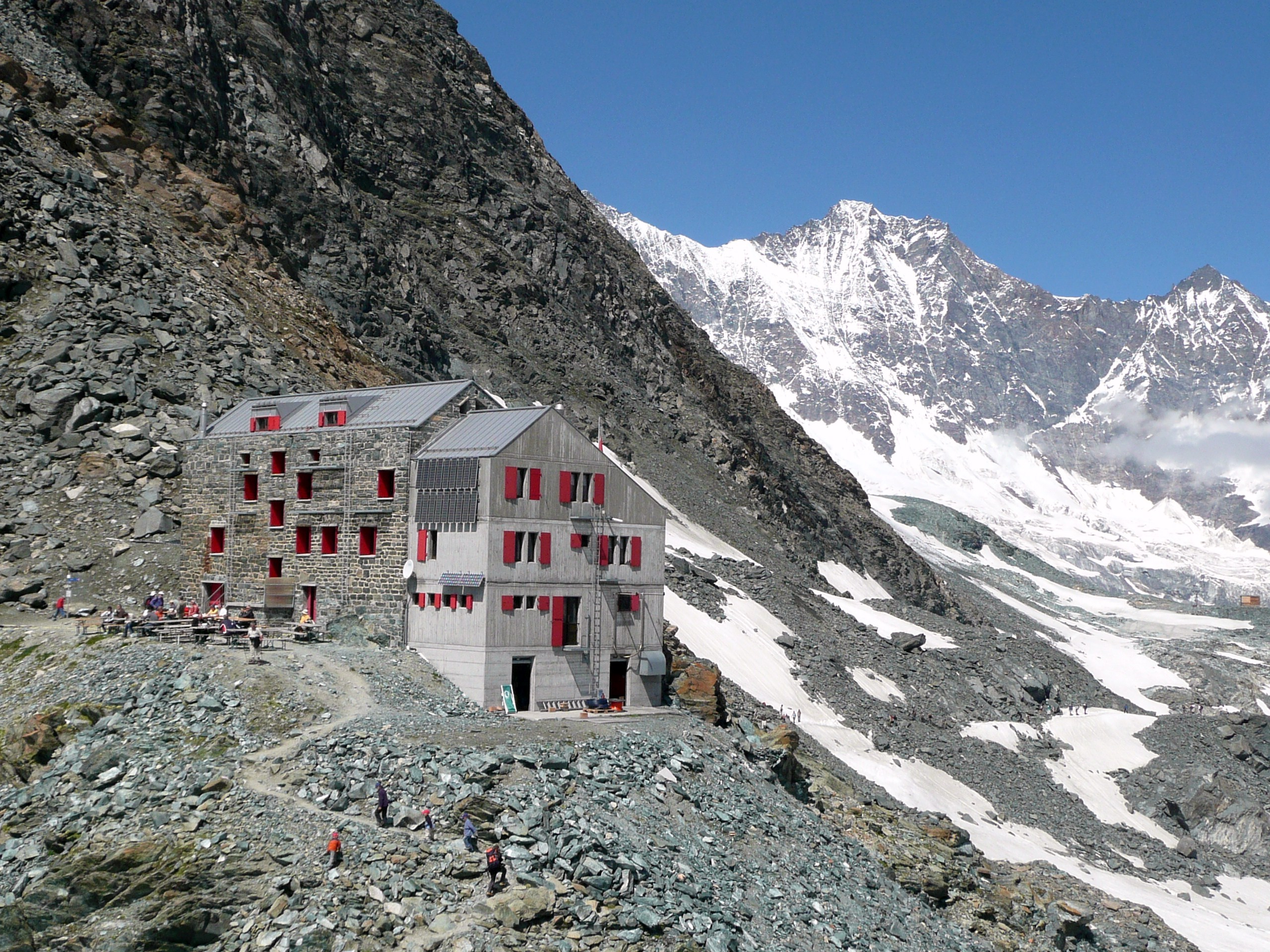 SAC Britanniahütte mit Mischabelgruppe (von links Dom und Lenzspitze)